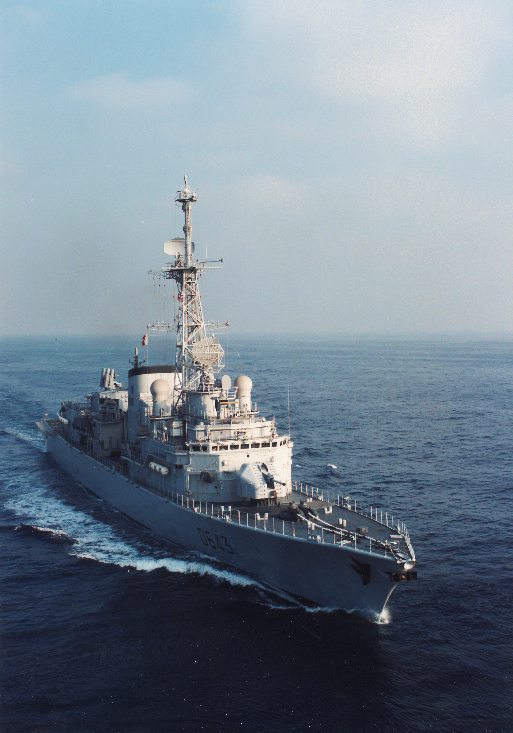 Prise de vue aérienne de la frégate Jean de Vienne D643.